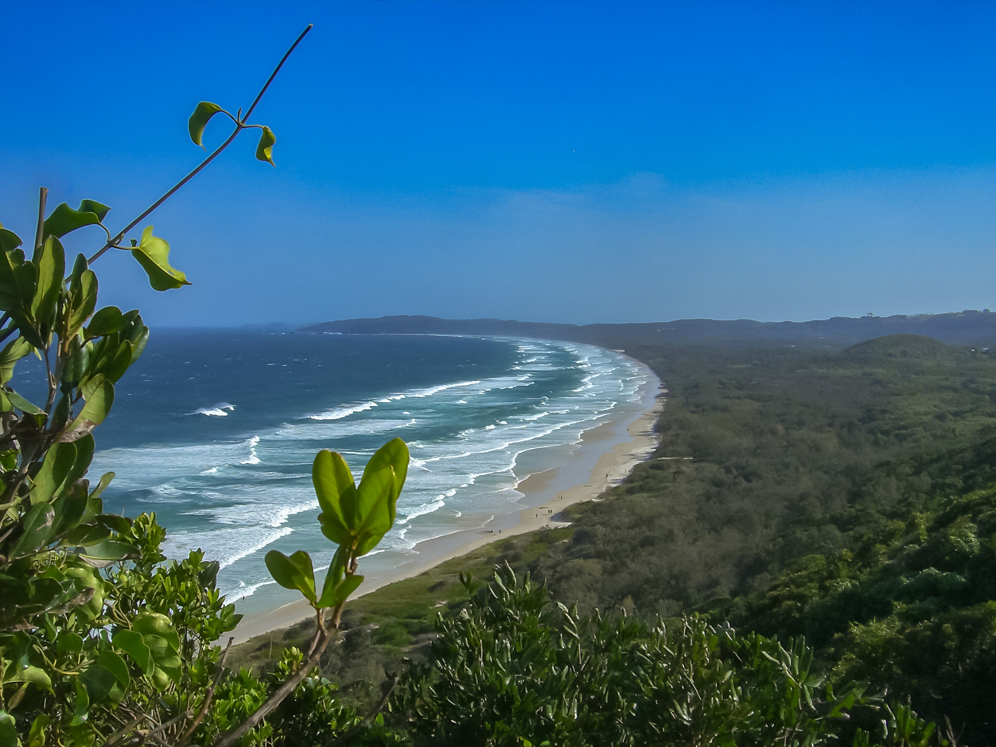 500px provided description: Byron Bay ist ein Badeort an der Nordk?ste des australischen Bundesstaates New South Wales [#landscape ,#nature ,#beach ,#travel ,#sun ,#freedom ,#lighthouse ,#vacation ,#live ,#relax ,#under ,#trip ,#australia ,#holiday ,#down ,#natur ,#sonne ,#strand ,#australien ,#urlaub ,#landschaft ,#leuchtturm ,#freiheit ,#reise ,#geotagged ,#byronbay ,#downunder ,#allgemein]